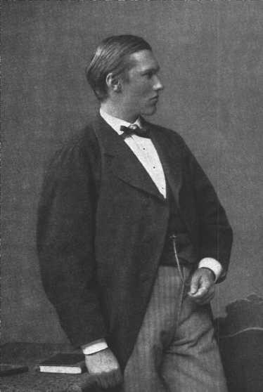 Ulrich von Wilamowitz-Moellendorff in Greifswald